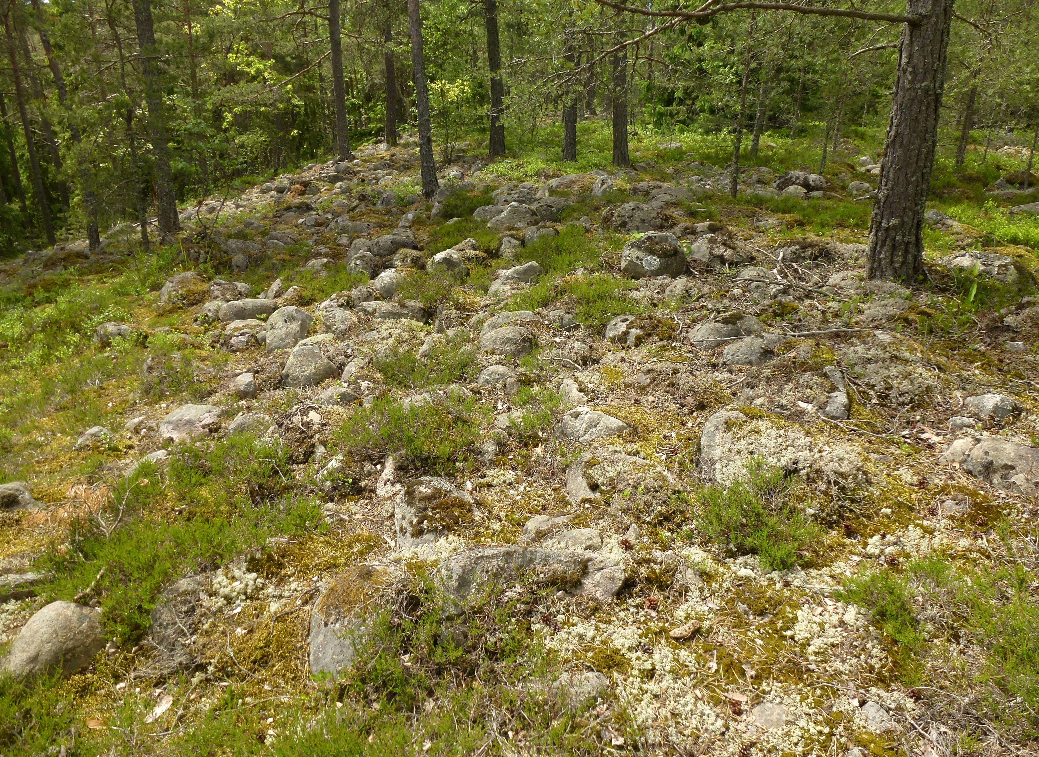 Pålamalms naturreservat, klapperstensområde